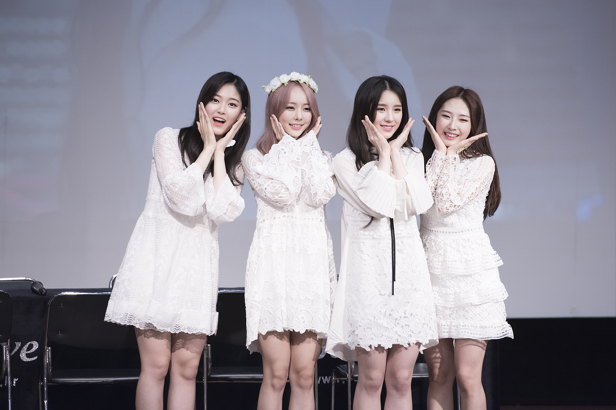 2017 04 30 이달의소녀 13 영등포 팬싸인회